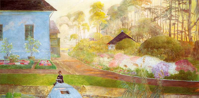 Dzieciństwo - Jacek nad stawem w Wielgiem - z cyklu Moje życie